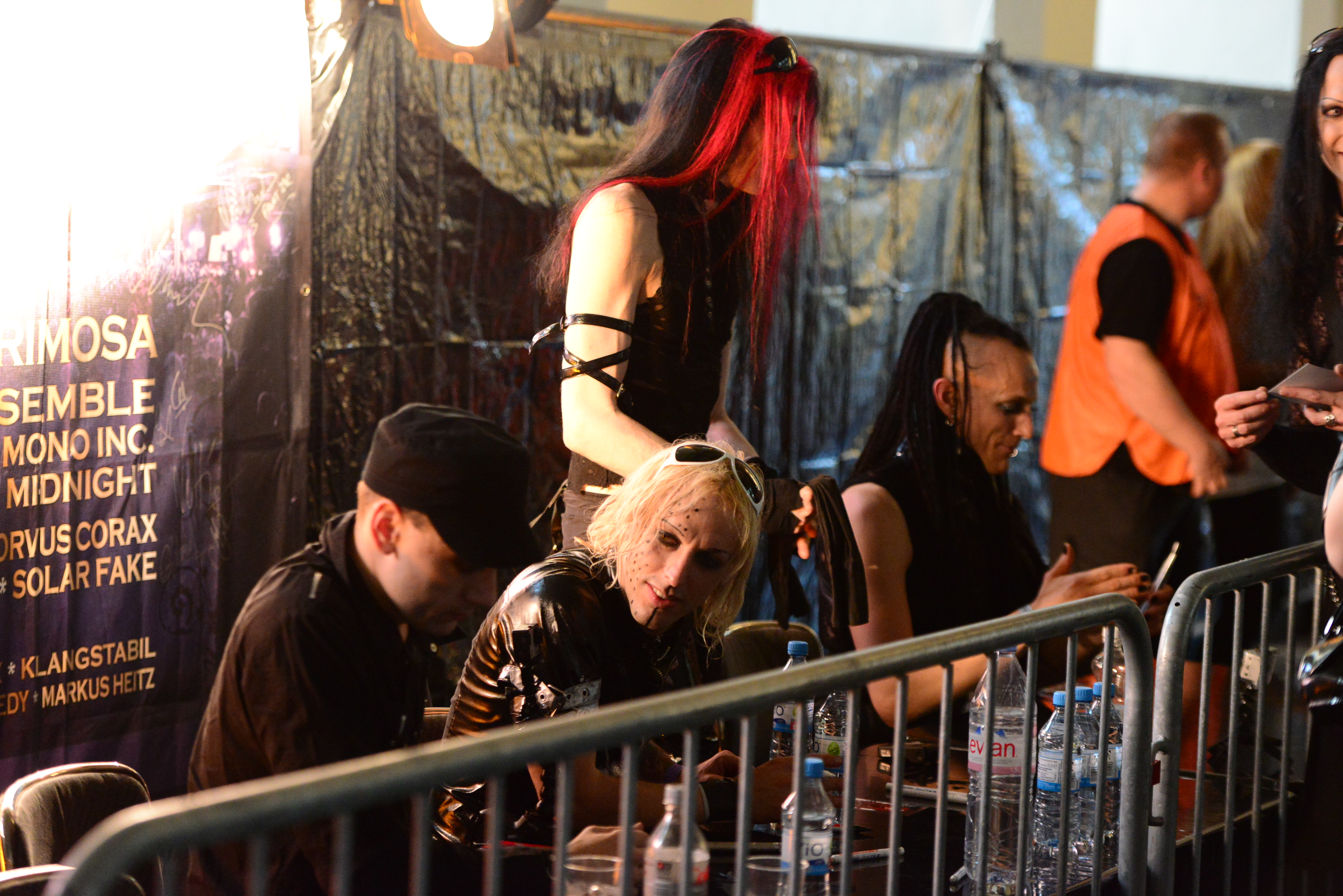 Signing sessions: London After Midnight, Amphi festival 2014